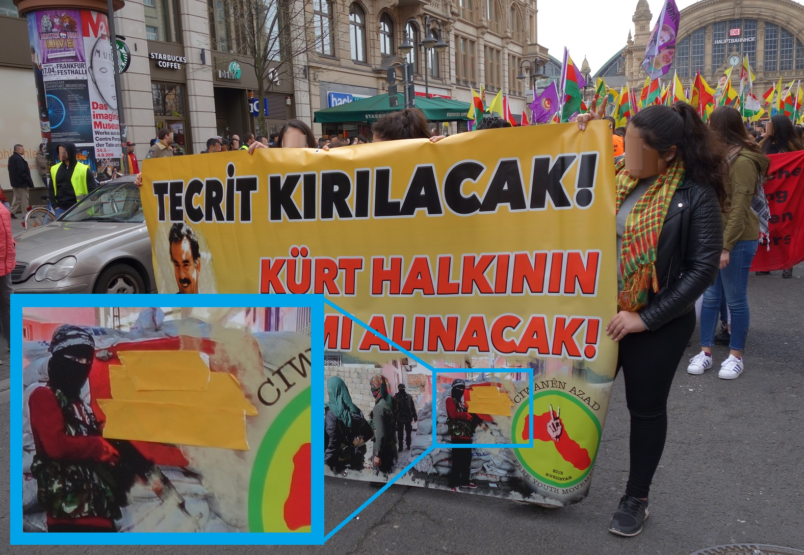 Da die PKK in Deutschland verboten ist, darf auch ihr Logo nicht in der Öffentlichkeit verwendet werden. Bei einer Demonstration in Frankfurt musste es auf diesem Transparent überklebt werden aufgrund polizeilicher Anordnung.